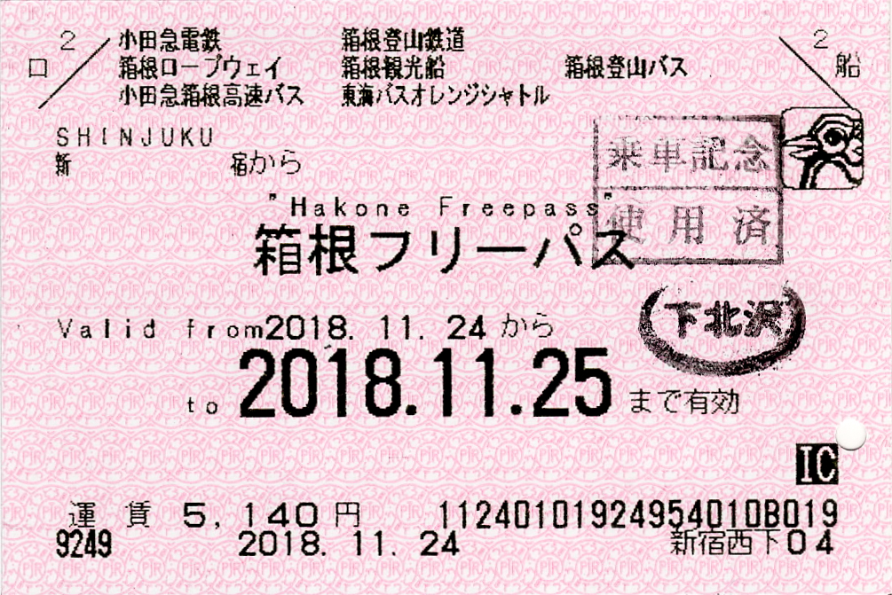 小田急電鉄発行 箱根フリーパス